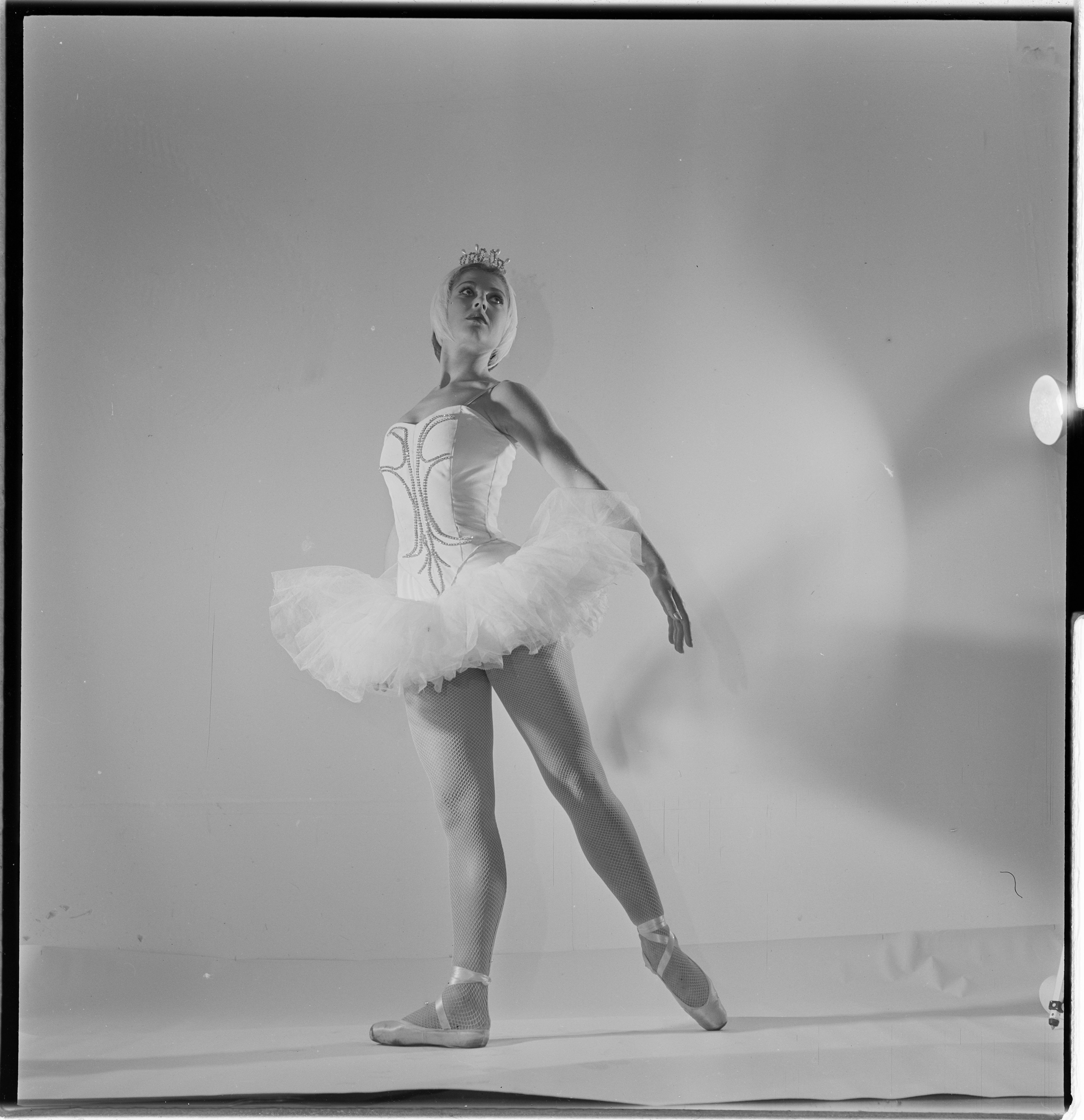 Bildet er hentet fra Arkivverket. Mette Møller, ballett Arkivinstitusjon : Riksarkivet Arkivnavn : Billedbladet NÅ Sted : Norge, Ukjent, Ukjent, Ukjent Emneord: Ballett Avbildet: Møller, Mette